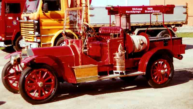 Durkopp 50 PS Fireengine